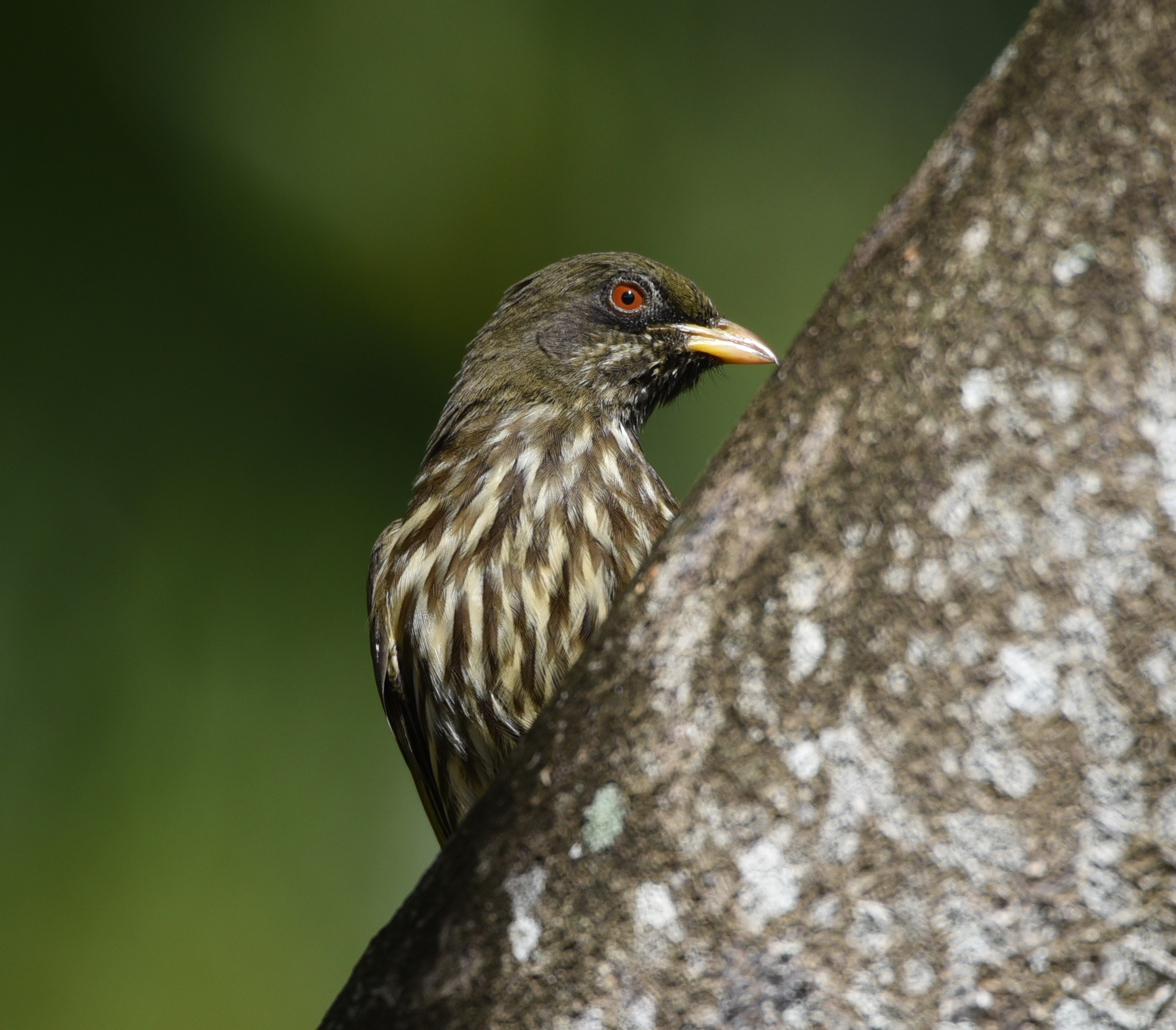 Palmenschwätzer Dulus dominicus Aufnahme La Romana, Dominikanischen Republik